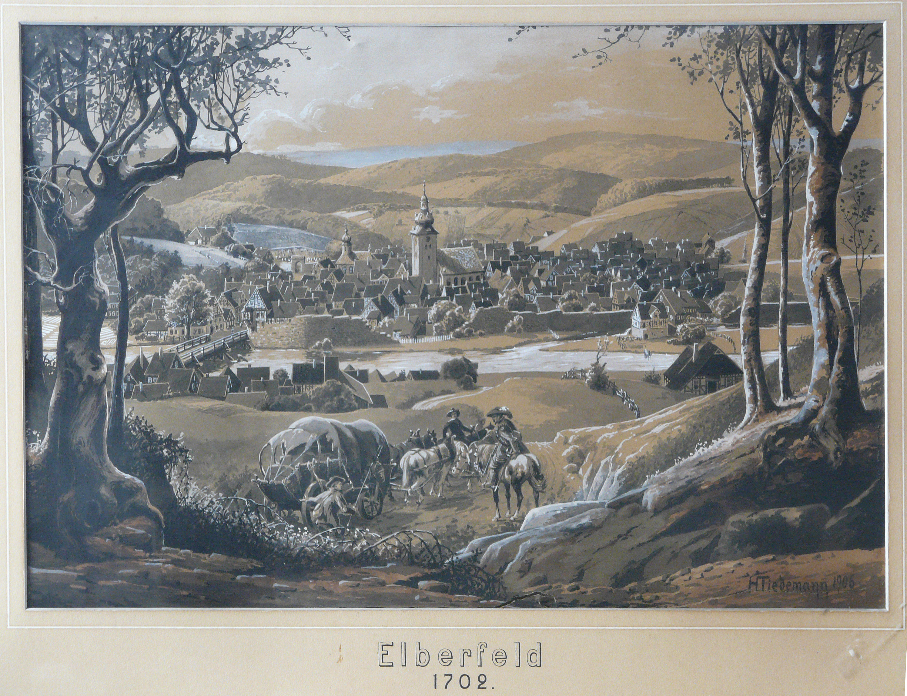 Das Bild befindet sich in der Sammlung des Historischen Zentrums Wuppertal